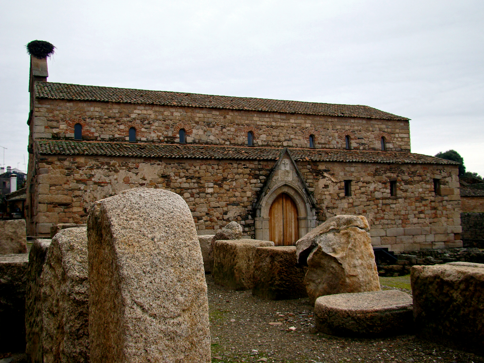 catedral idanha a velha This monument is classified as Monumento Nacional. This file was uploaded for Wiki Loves Monuments in Portugal with the unique identifier 70554.